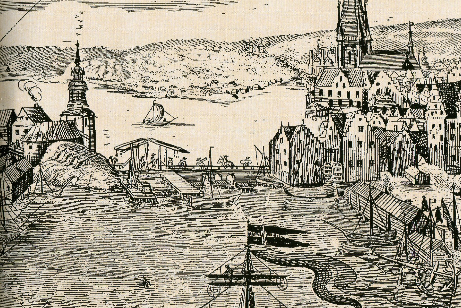 Gamla "Kristinas sluss" i Stockholm från 1642, Mälaren i bakgrunden. Kopparstick gjord till drottning Kristinas kröning 1650 av Wolfgang Hartmann.